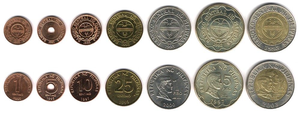 Peso filipino